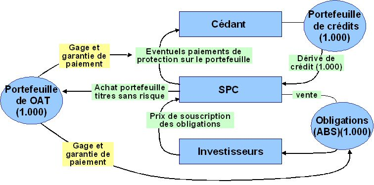 Description: Schéma d'une titrisation synthétique Source: Bradypus Licence: Bradypus